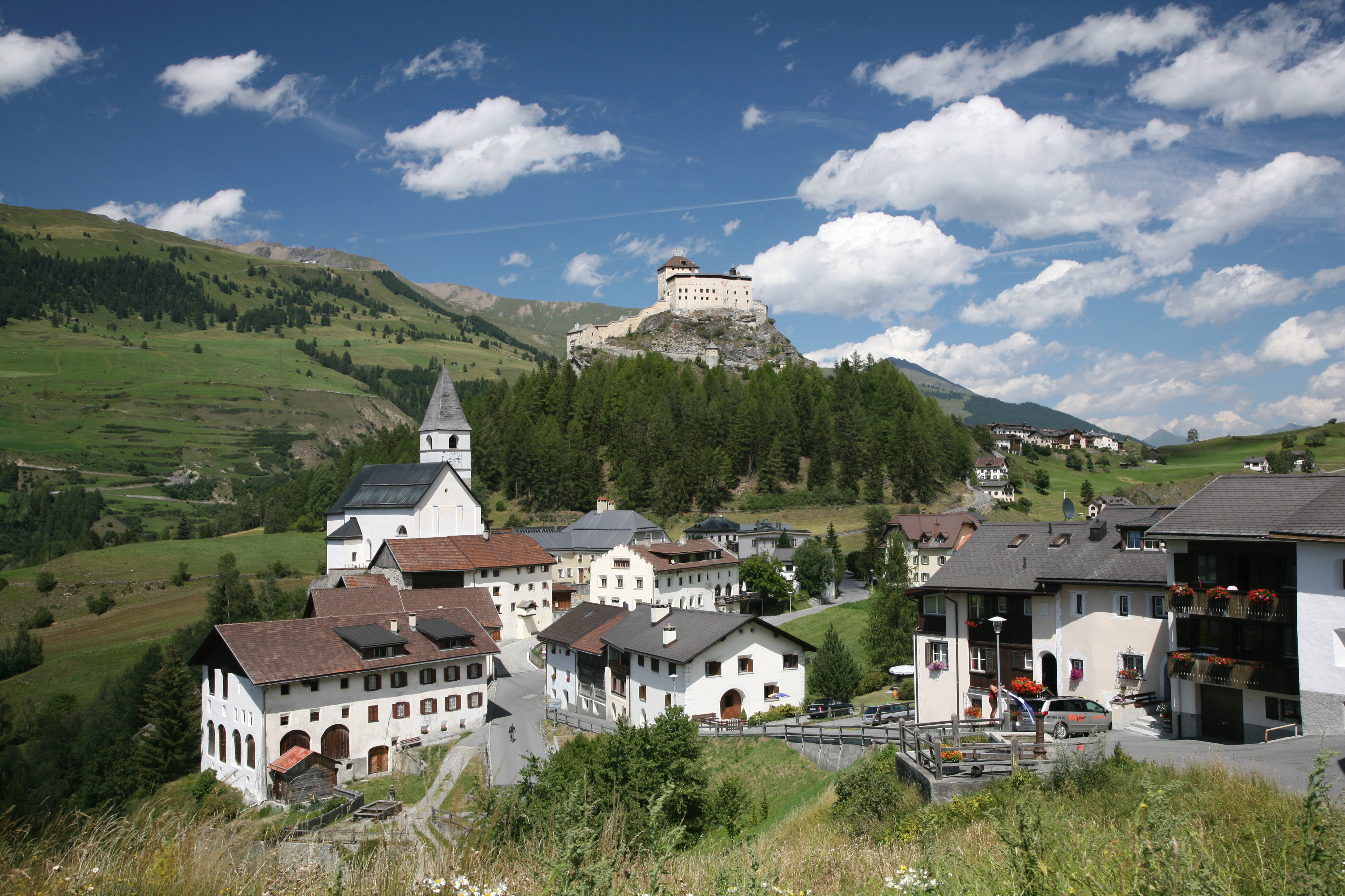 Tarasp Fontana im Unterengadin